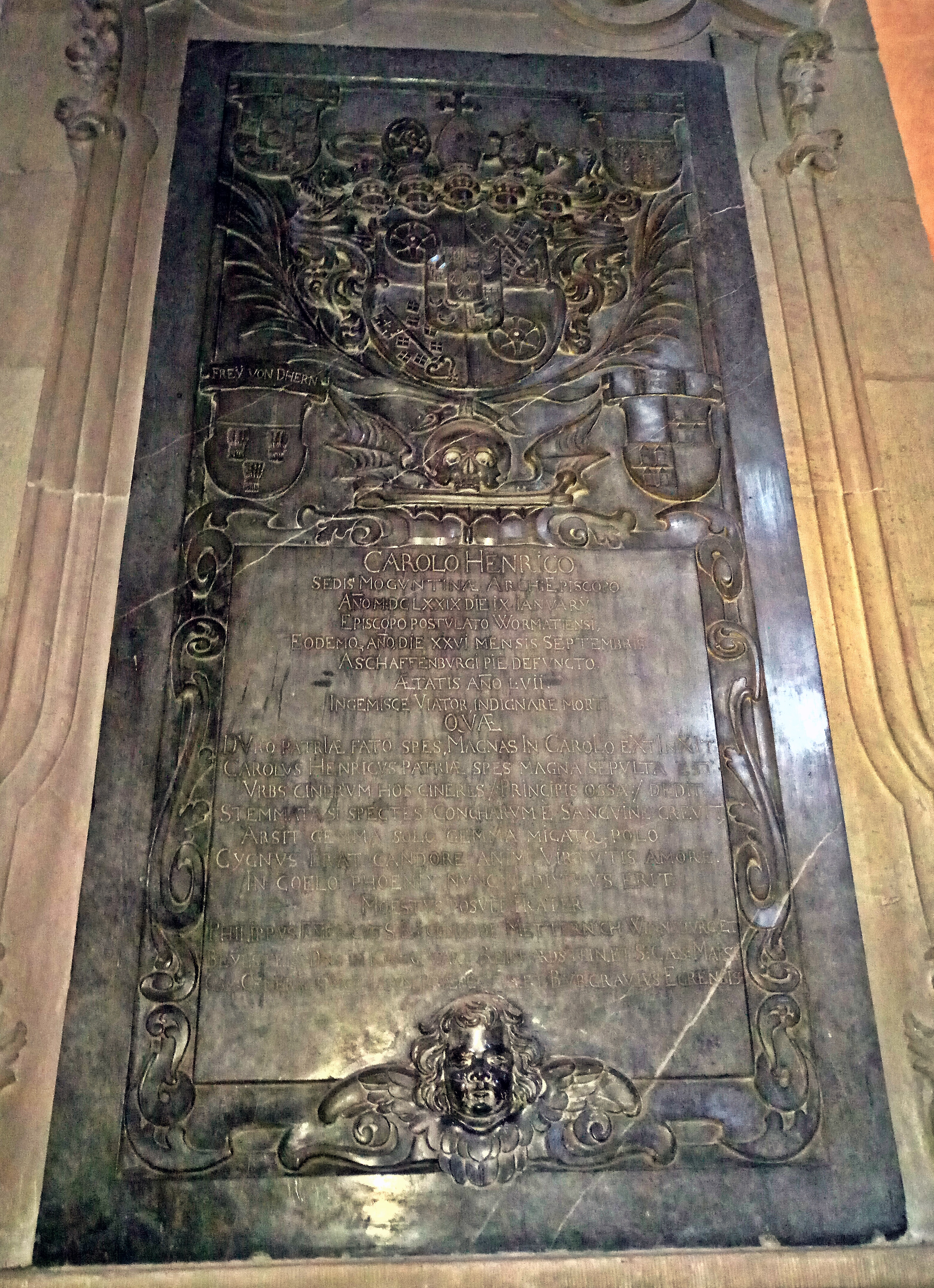 Mainzer Dom, Grabdenkmal Bischof Karl Heinrich von Metternich-Winneburg (+ 1679)